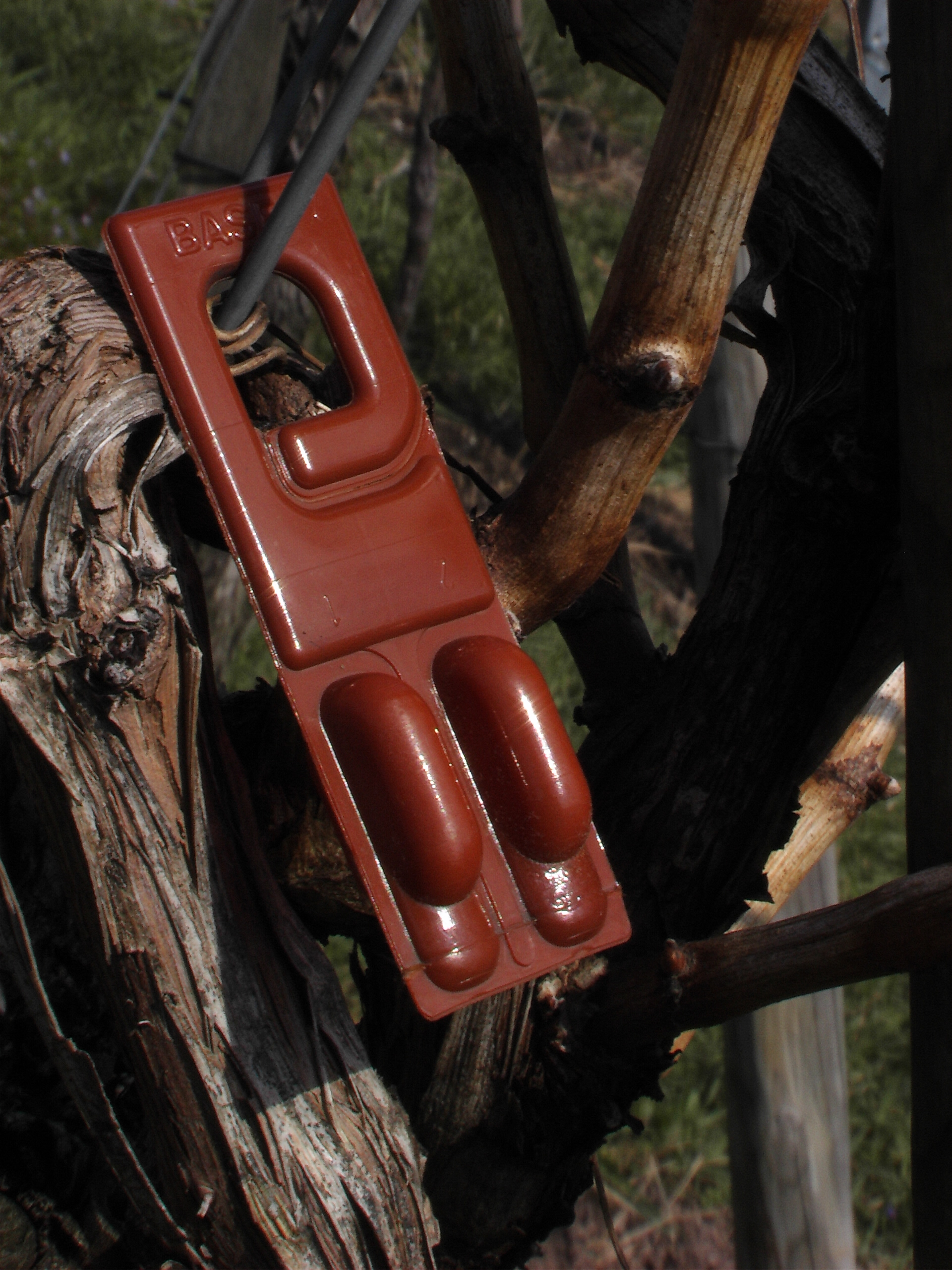 Doppelampulle Pheromon RAK BASF